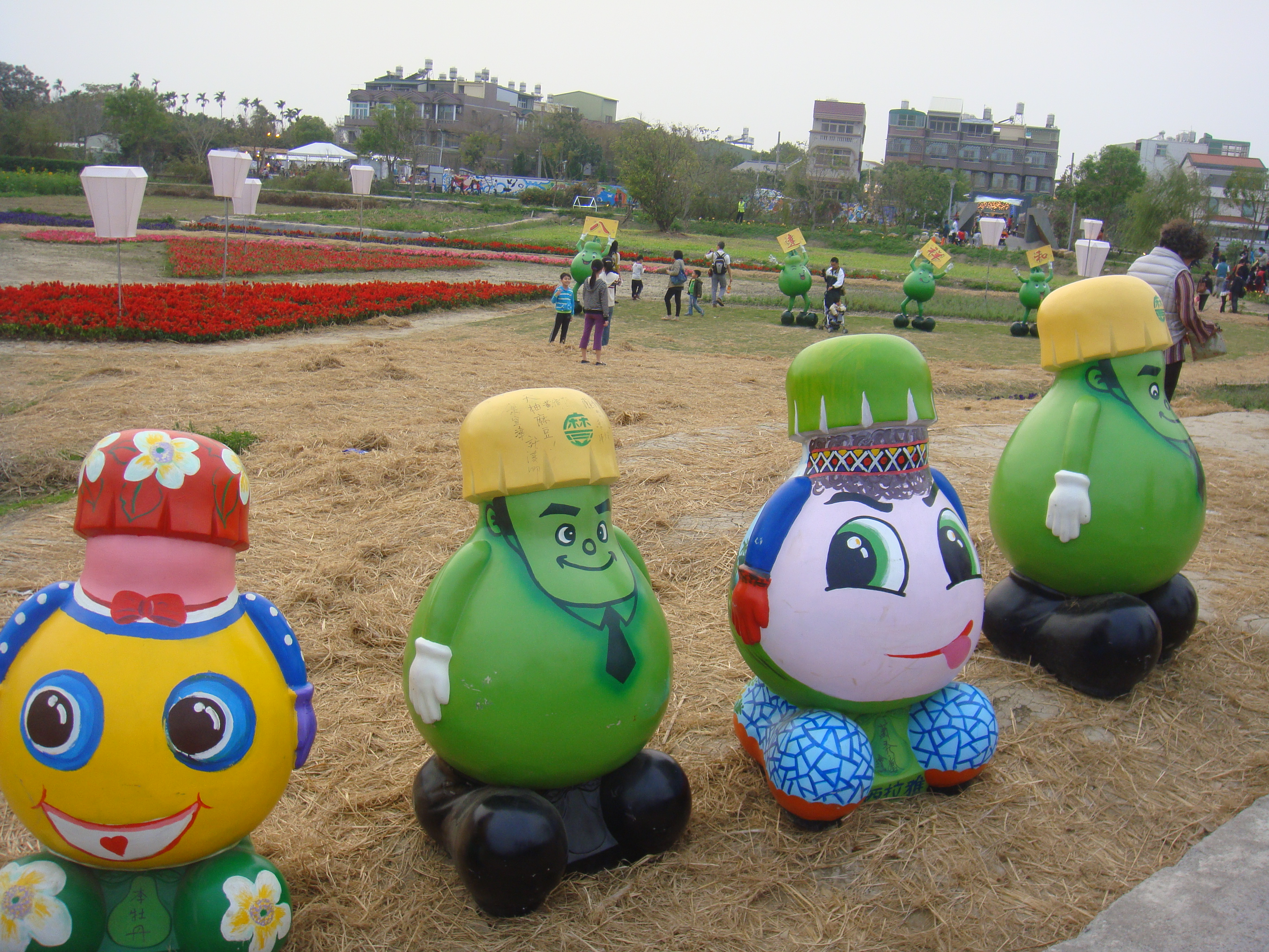 2015月津港燈節信義路位於旁的花圃